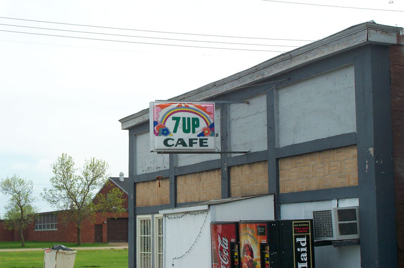 Strandquist, Minnesota. From .